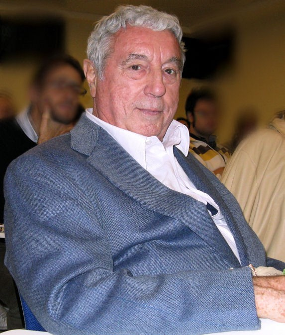 Sergio Bonelli tra il pubblico di un convegno al Lucca Comics 2009